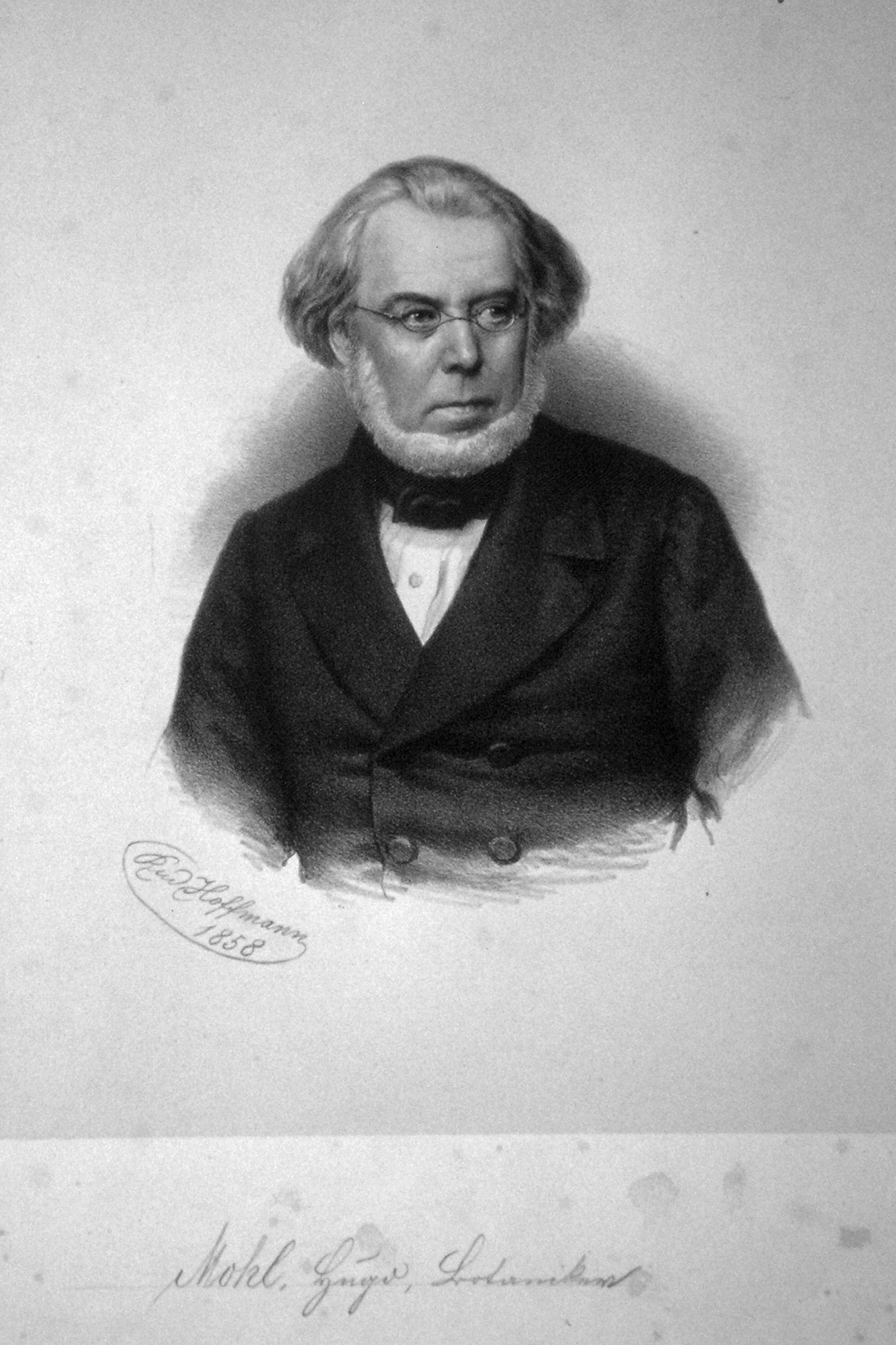 Hugo von Mohl, deutscher Botaniker. Lithographie von Rudolf Hoffmann, 1858